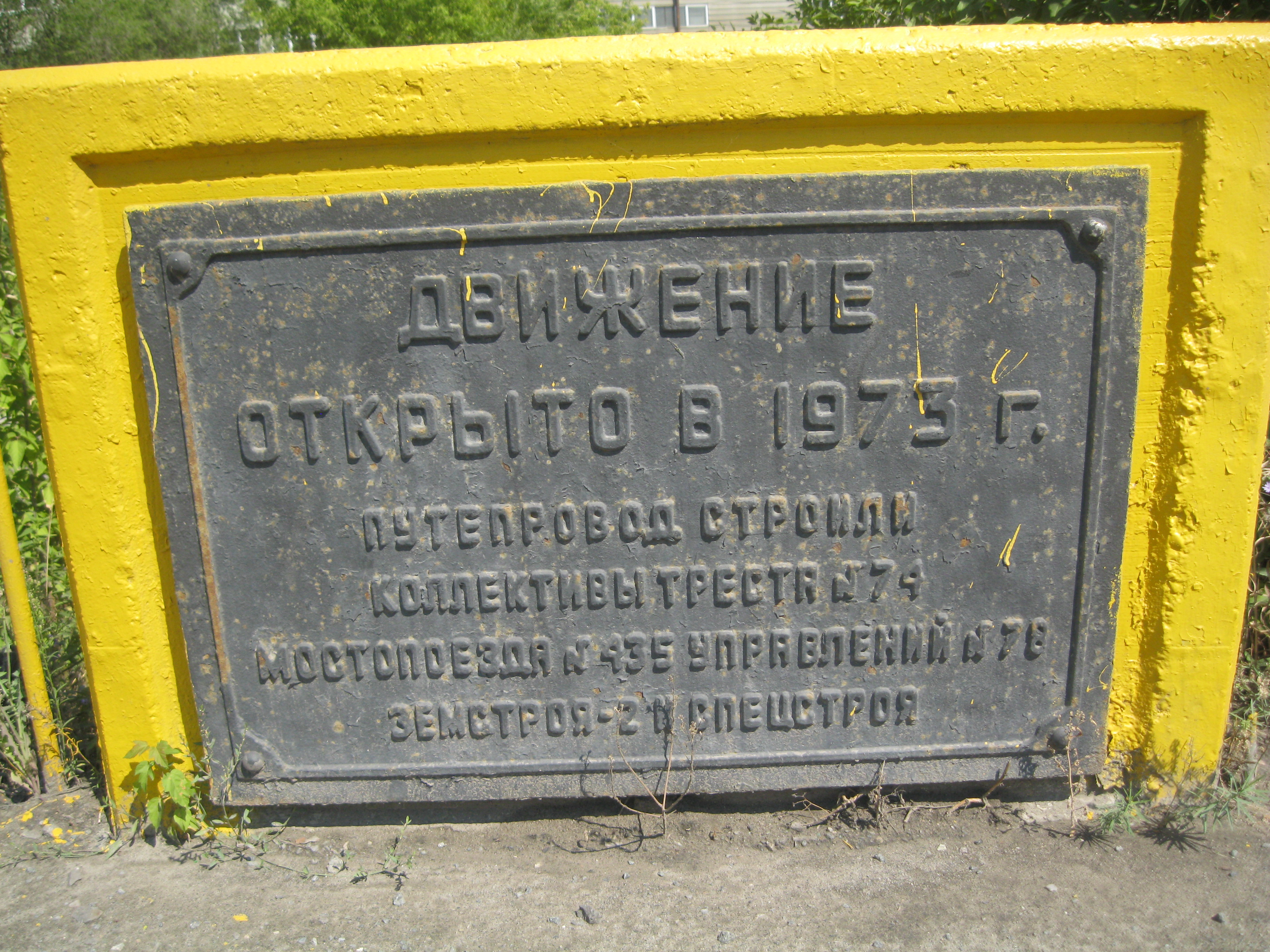 Доска о строительстве Промышленного путепровода в Кургане, Россия